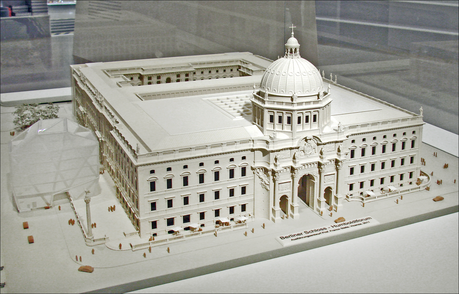 La maquette du nouveau projet avec à gauche la Humboldt-Box L'architecte sélectionné est l'italien Franco Stella L'Humboldt-Box installée en mai 2011 a pour but d'informer in situ sur le projet d'Humboldt-Forum et de présenter une exposition de préfiguration. Cette exposition sur trois étages comprend un niveau consacré à l'histoire du Palais Royal (Schloss) et du nouveau projet architectural de Franco Stella ainsi que deux niveaux présentant les collections des musées de Dahlem, quelques exemples d'archives multimédias issus des recherches et certaines thématiques scientifiques et culturelles qui seront au coeur de l'Humboldt-Forum. Un niveau est réservé aux évènements et le niveau supérieur comprend un bar-terrasse. Site pour la reconstruction du Château site de la Humboldt-Box